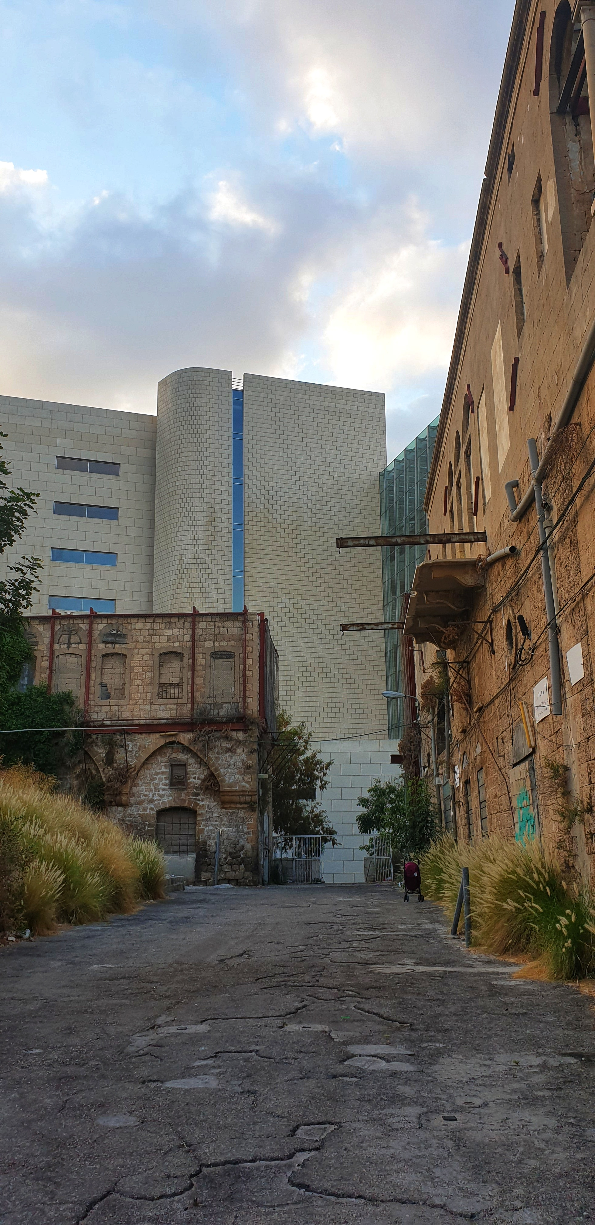 حي وادي صليب المُهمل